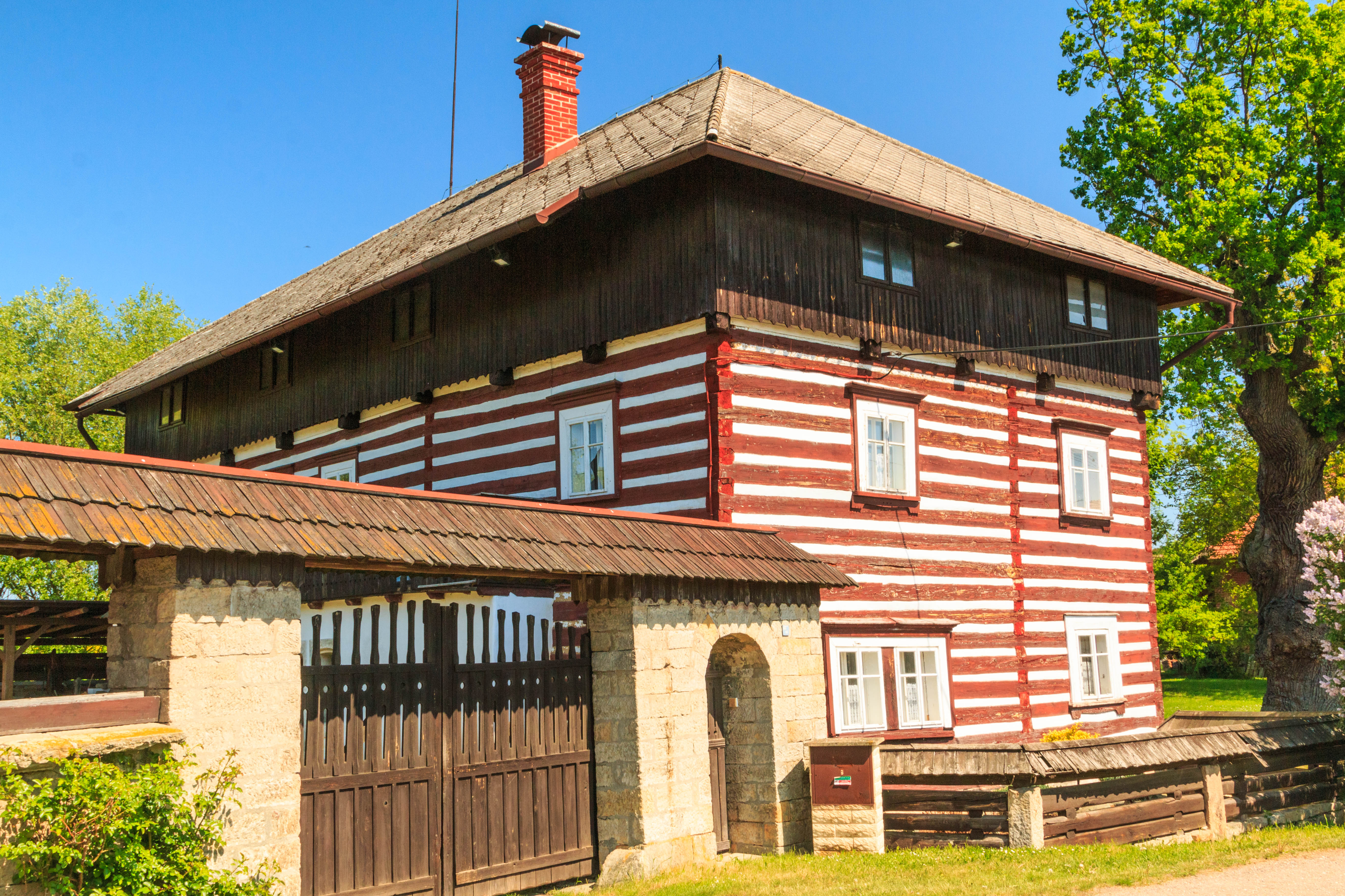 Popovický mlýn Project: Vodstvo